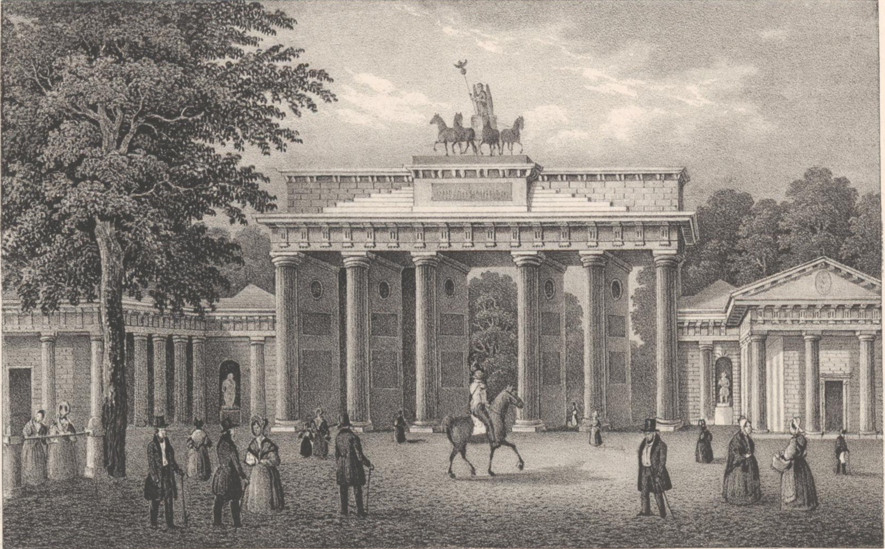 Das brandenburger Thor in Berlin, Lithographie : 18 x 12 cm, Heinrich Wilhelm Teichgräber